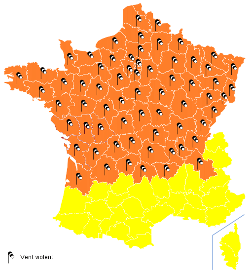 Carte de Vigilance pour la tempête Klaus avant 16h00. Carte de vigilance météo pour la journée du 27 février 2010 au 28 février à 18h15.